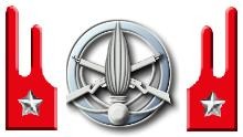 Mostrine e fregio Fucilieri Sicurezza